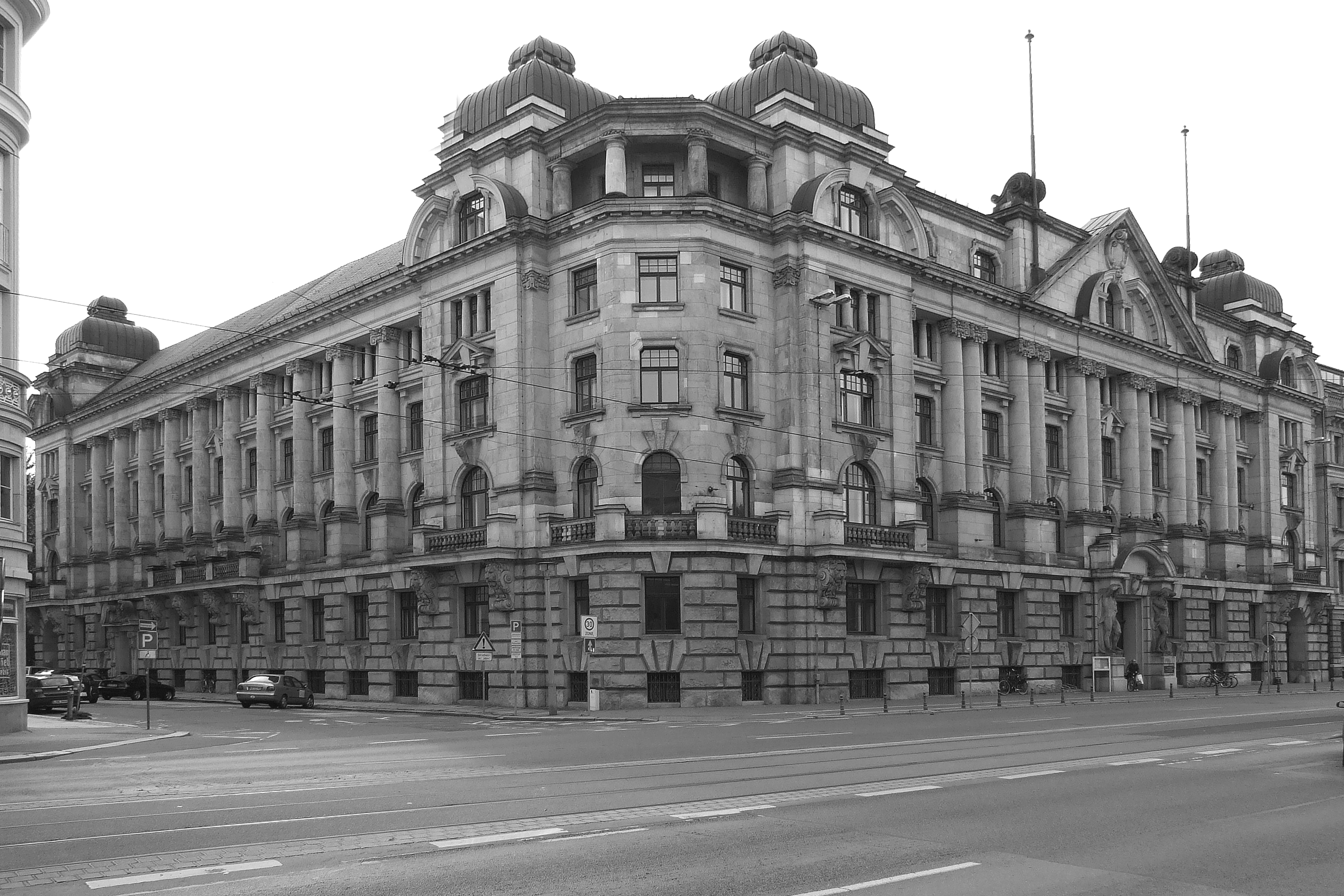 Hochschule für Musik und Theater "Felix Mendelssohn Bartholdy" am Dittrichring, Leipzig